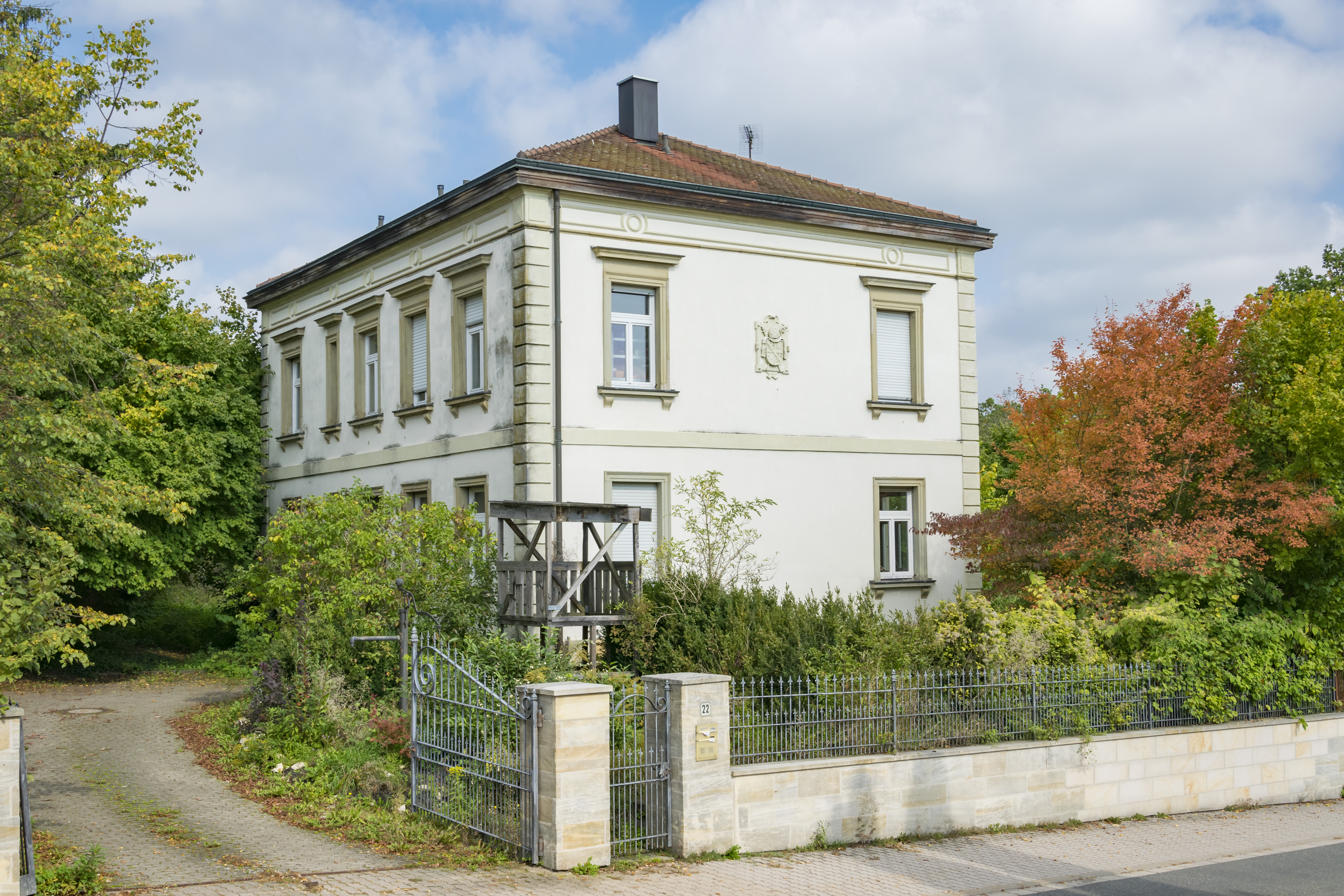 Das PfarrhausThis is a photograph of an architectural monument.